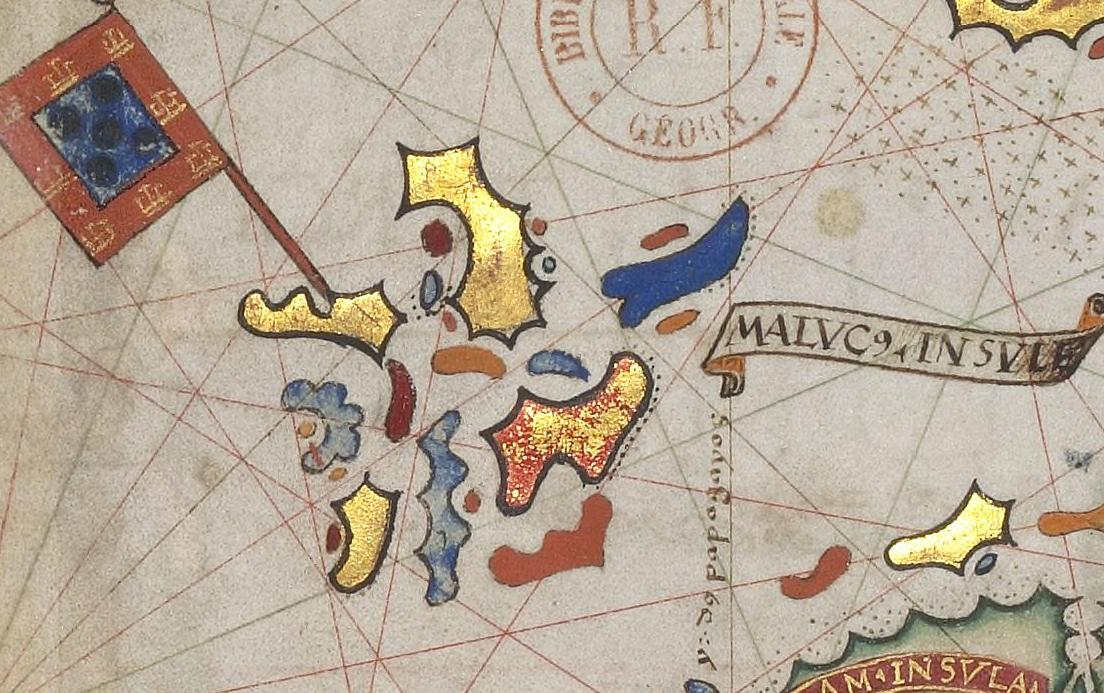 Las islas Molucas en un mapa regional del Atlas Miller.